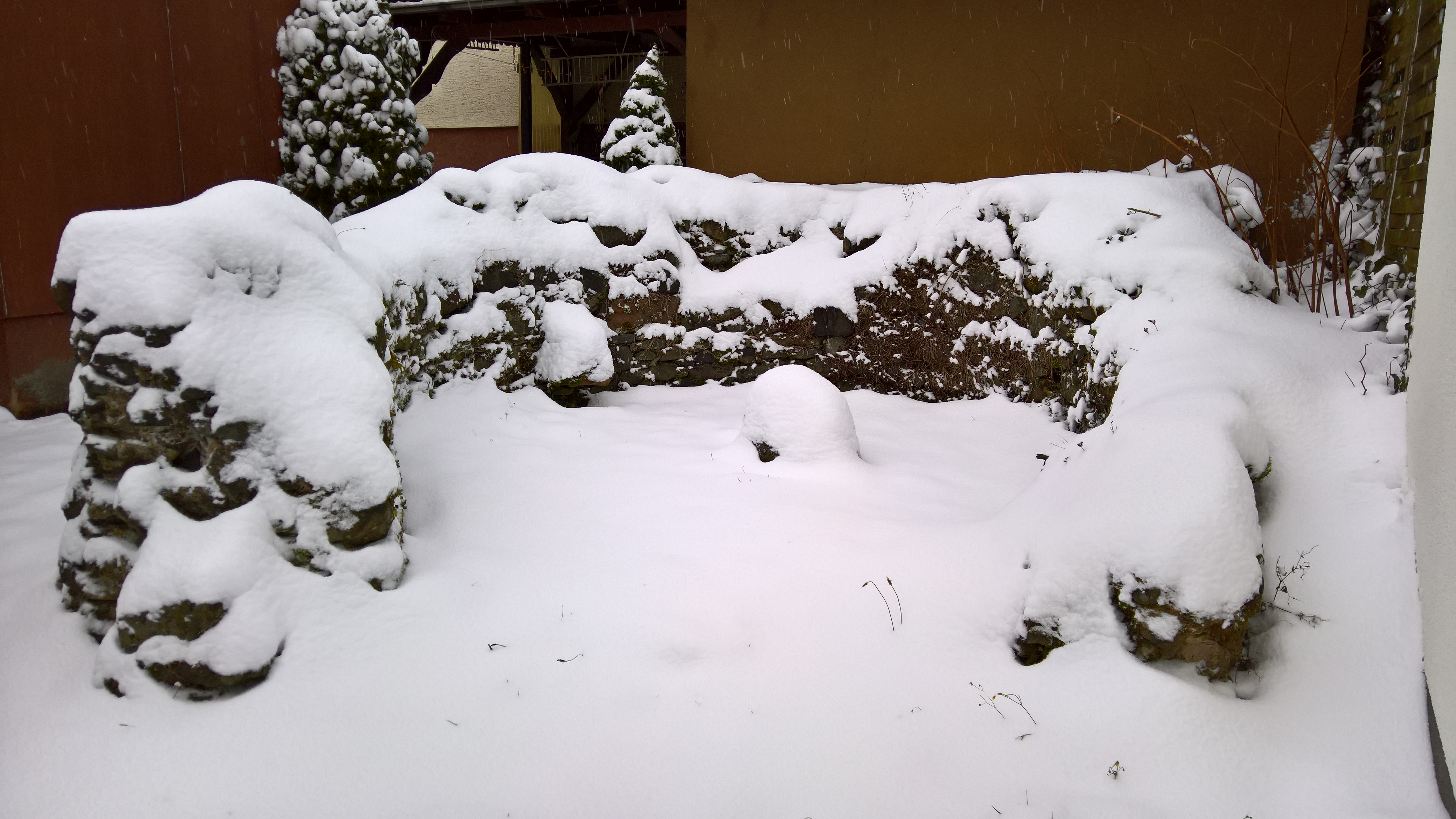 Der Turmstumpf unter Schnee des Burgstalles Spyelberg